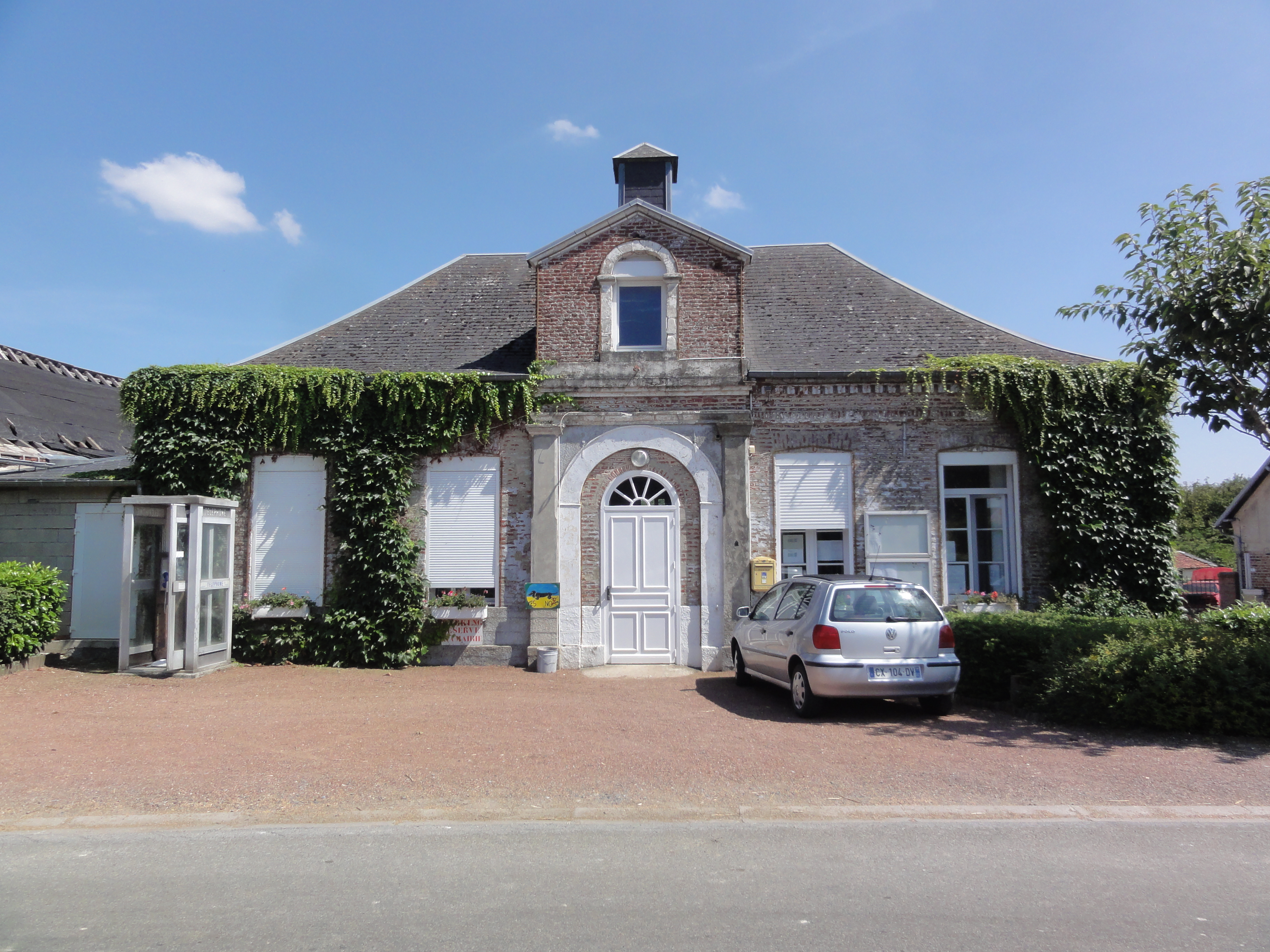 Pleine-Selve (Aisne) mairie